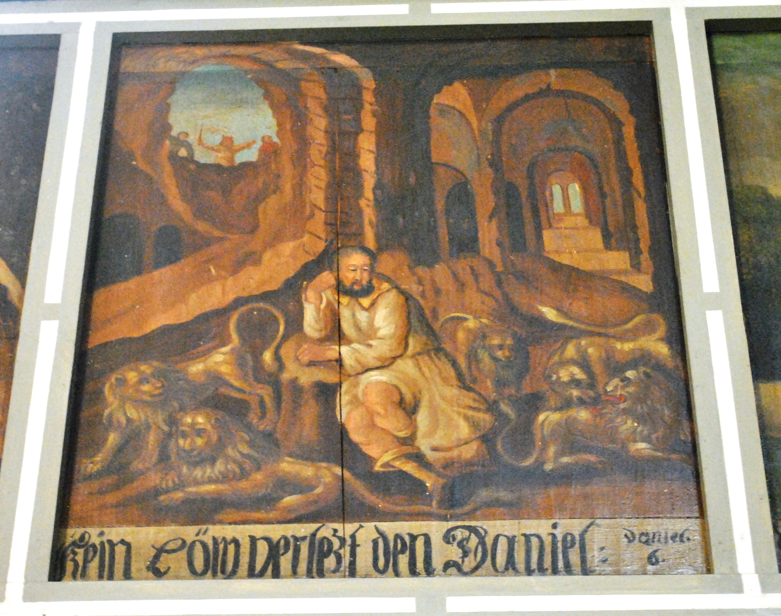 Armenbibel, Empore St. Nikolai Marktbreit, Altes TestamentThis is a photograph of an architectural monument.